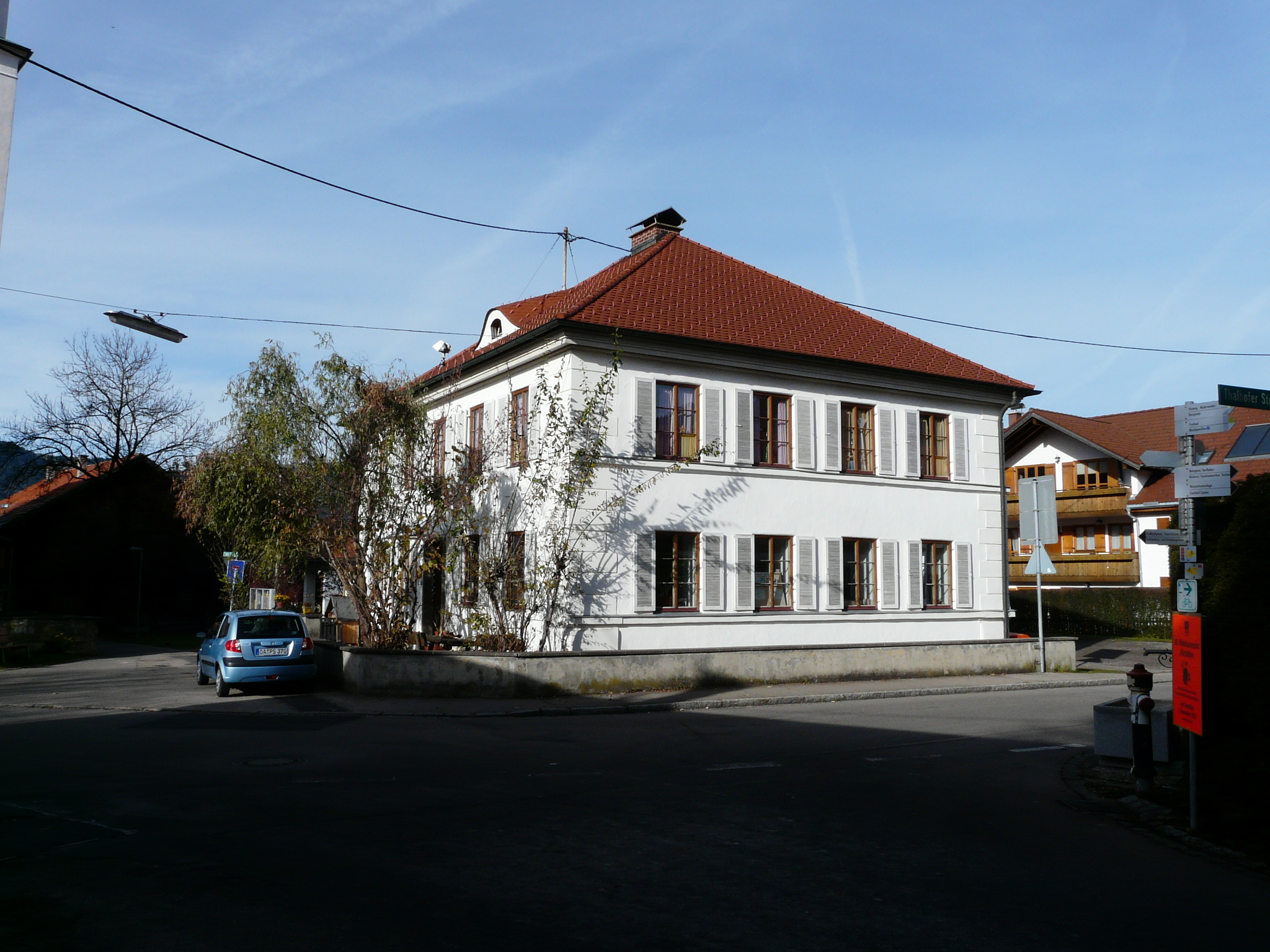 Pfarrhof in Altstädten, Sonthofen